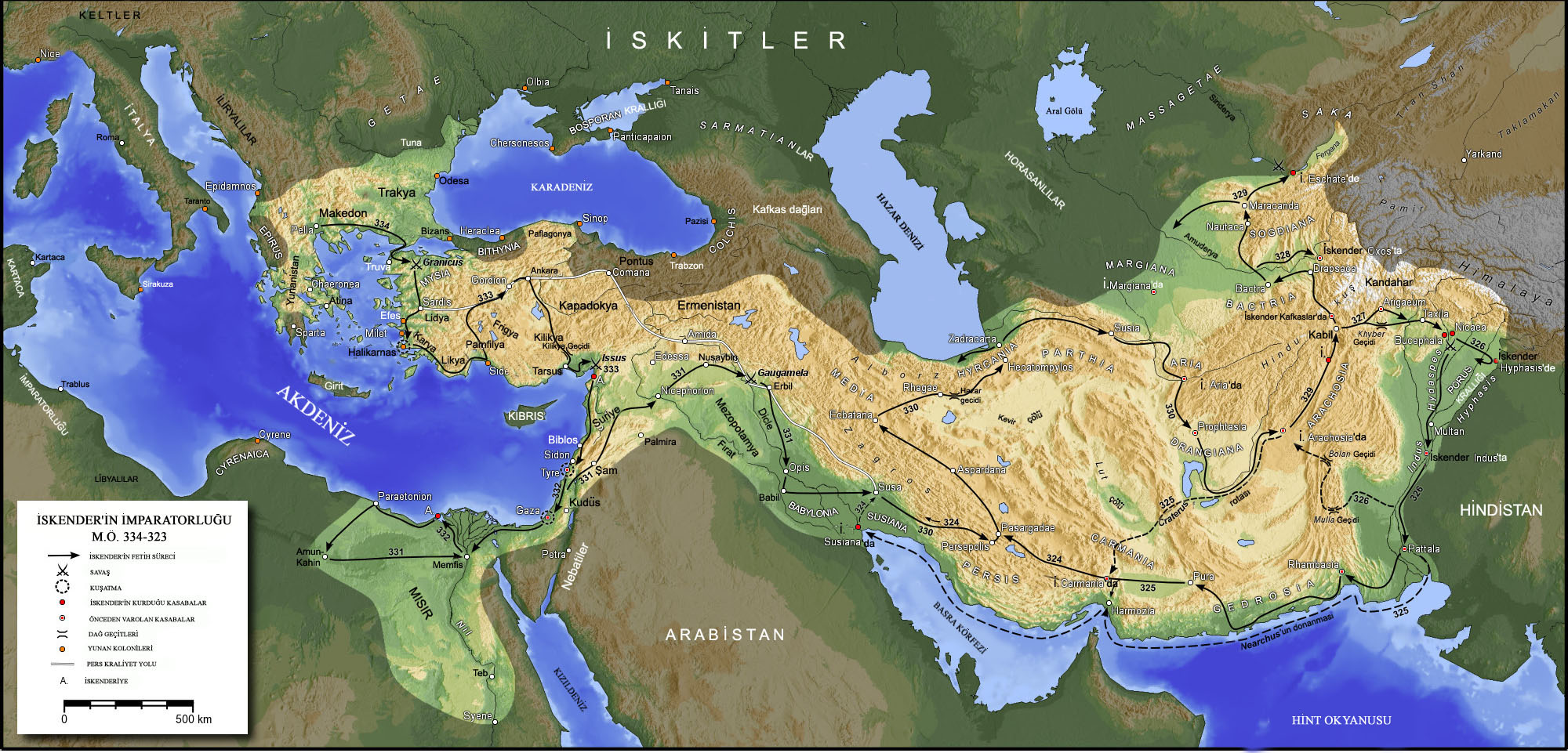 Resim:MacedonEmpire.jpg dosyasinin Turkcelestirilmis hali